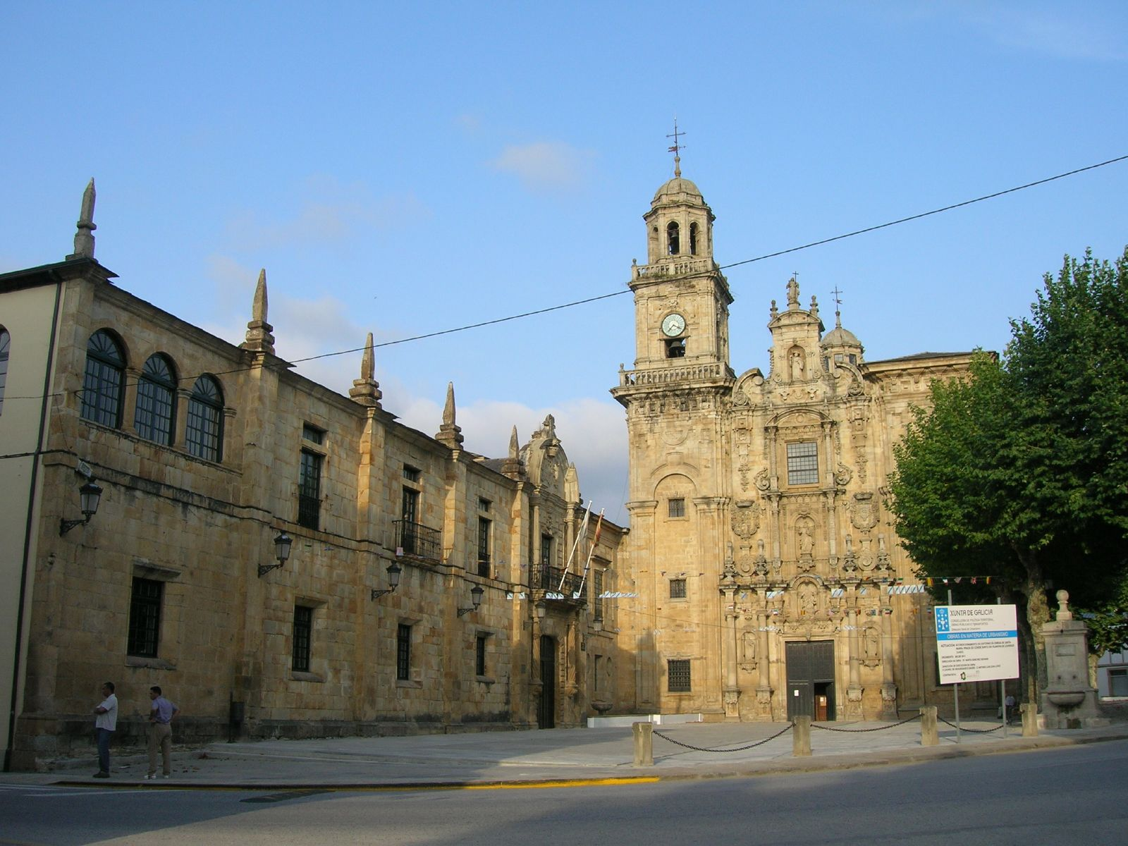 Monasterio de San Salvador de Lourenzá. El conjunto del edificio consta de una abadía y de la iglesia, además de diversas capillas, un convento, dos claustros y un patio. Destaca la fachada barroca del templo, reformada en 1732 por el maestro arquitecto de la catedral de Santiago de Compostela, Casas y Novoa.